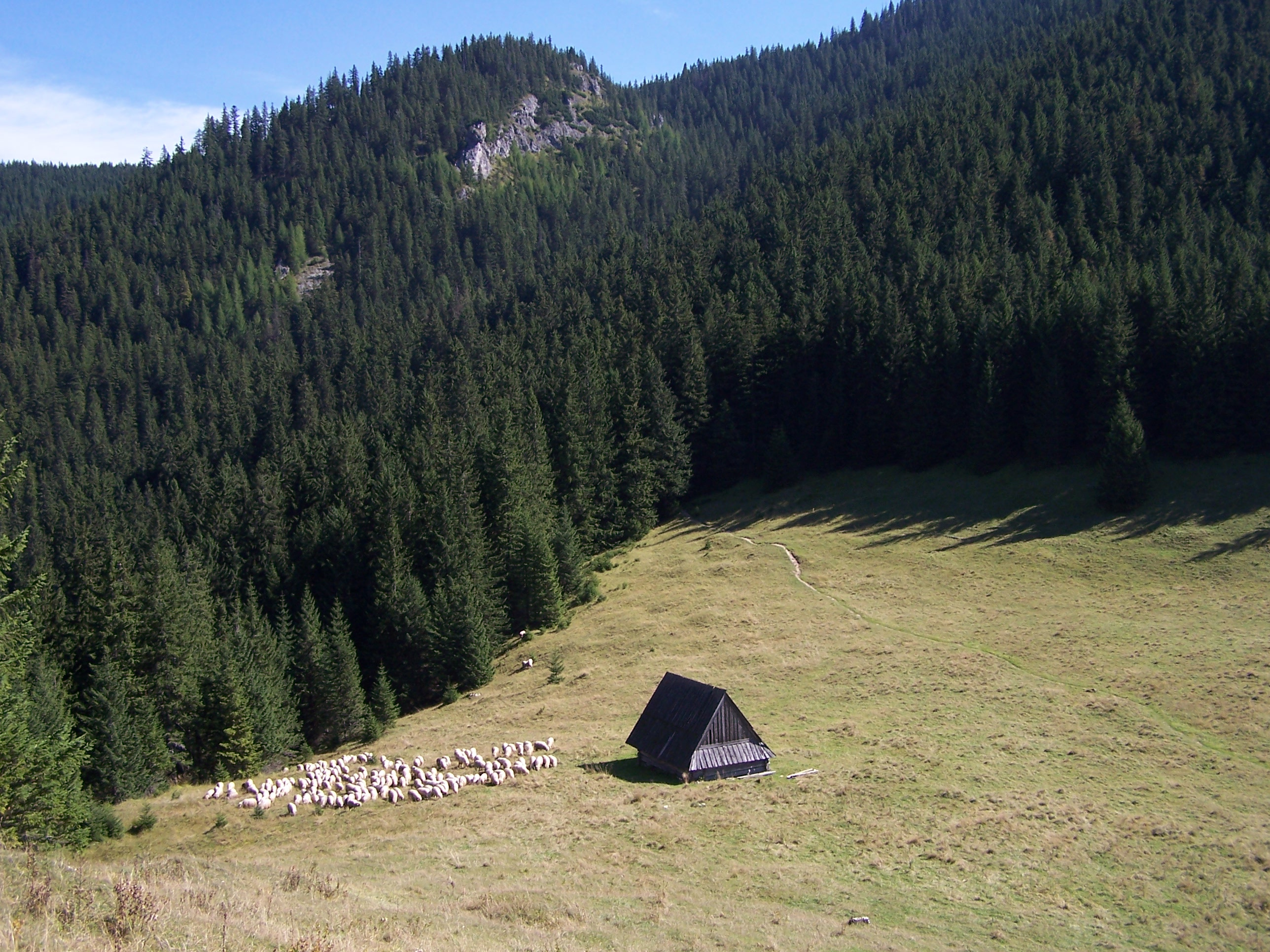 Polana Jamy (Tatra Mountains)